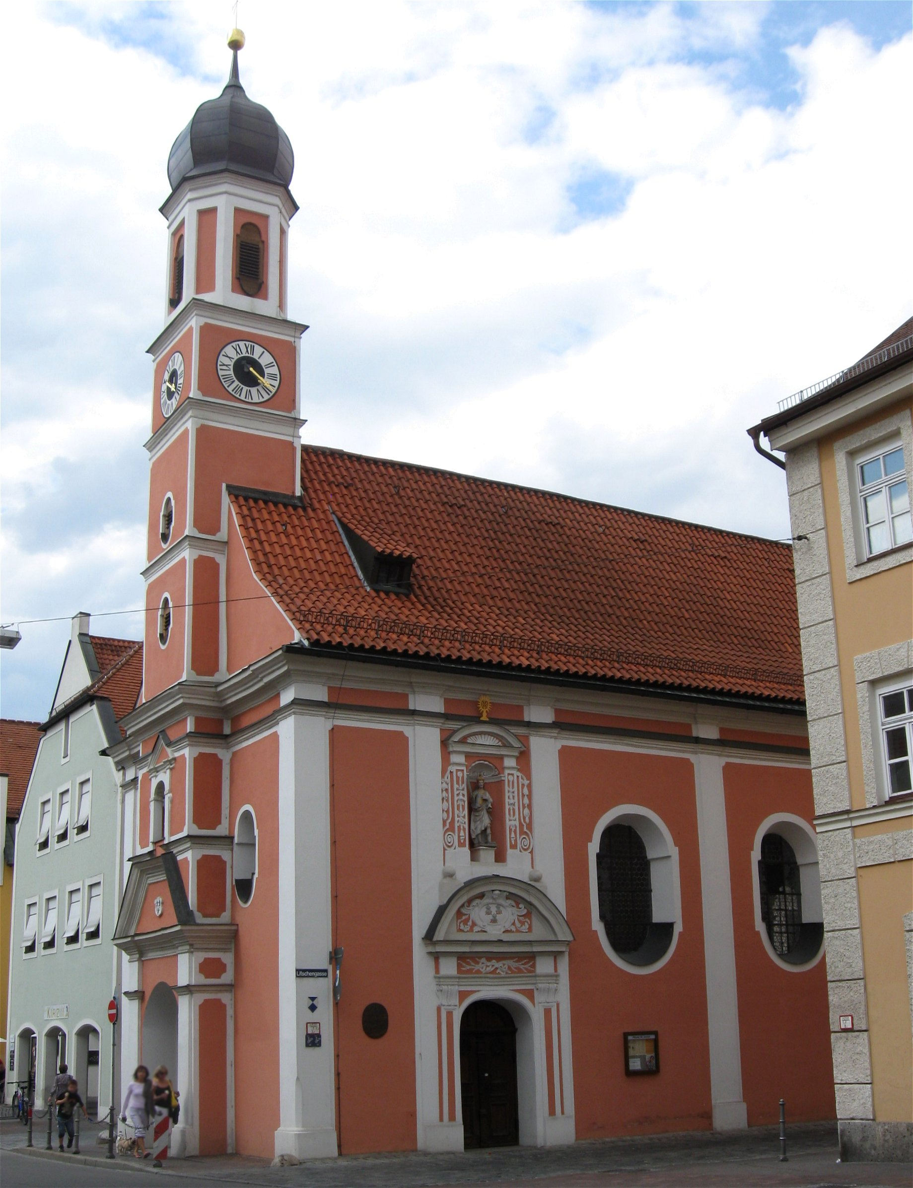 Litschengasse 716; Katholische Kirche St. Sebastian, im Kern spätgotisch um 1490, 1661 Verlängerung des Kirchenschiffs nach Osten und durchgreifende barocke Umgestaltung; mit Ausstattung. D-2-61-000-338